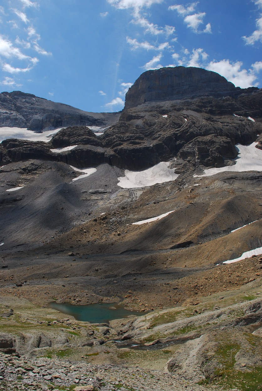 Pirineos de Huesca ( Valle de Ordesa ). Excursión de 8 horas - ida y vuelta - del Parador hasta el Lago Marboré ( desnivel 1200 m. ).